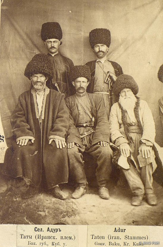 Группа мужчин-татов из селения Адур Кубинского уезда Бакинской губернии (ныне Кубинский район Азербайджана).